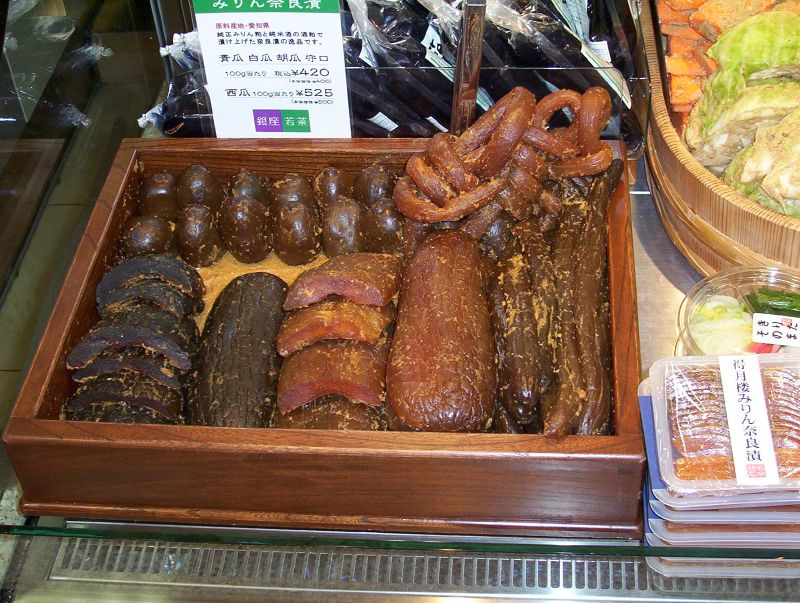 奈良漬け.04Aug2004 086